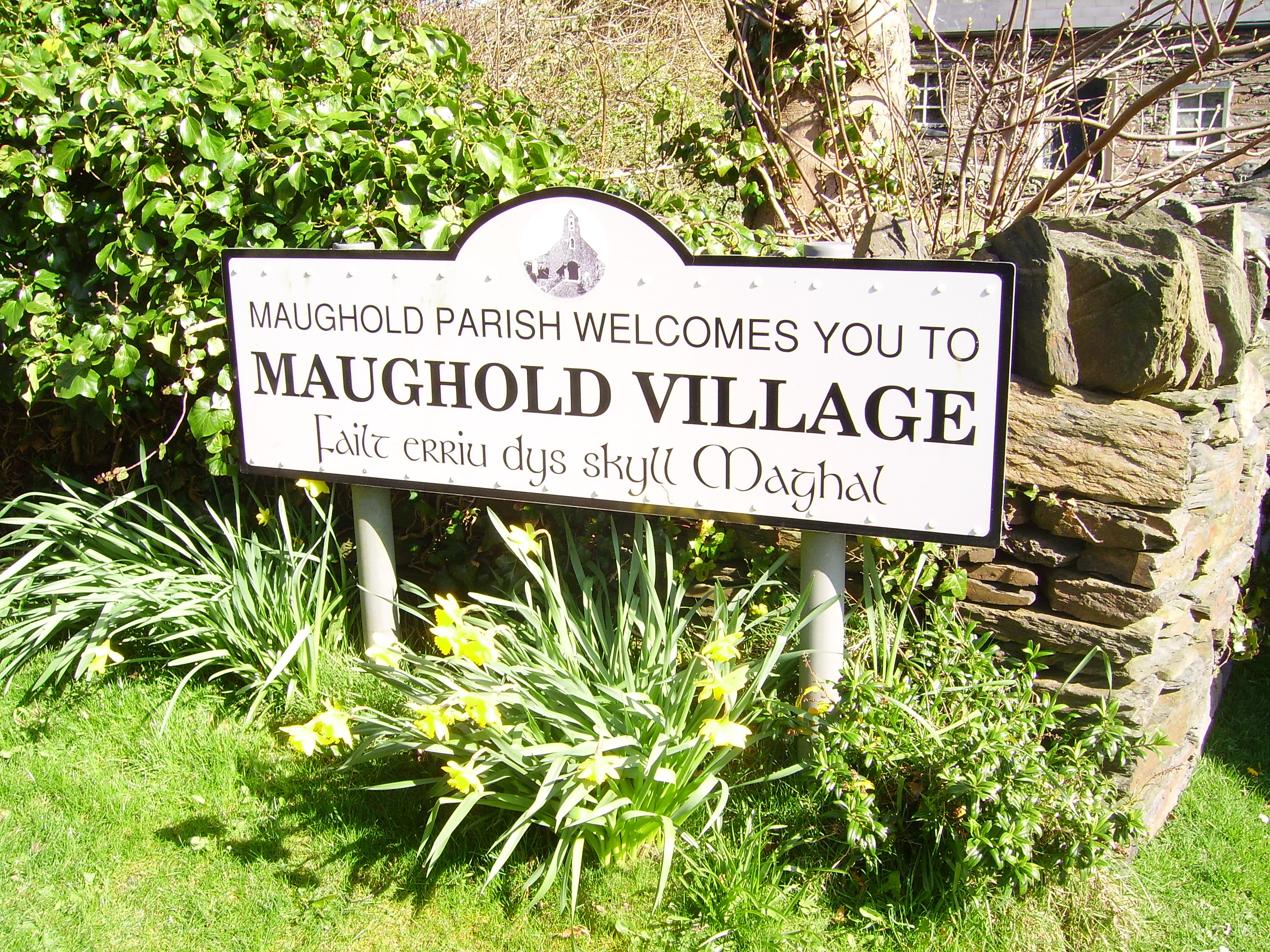 Gaelg: Obbyr lhiam pene